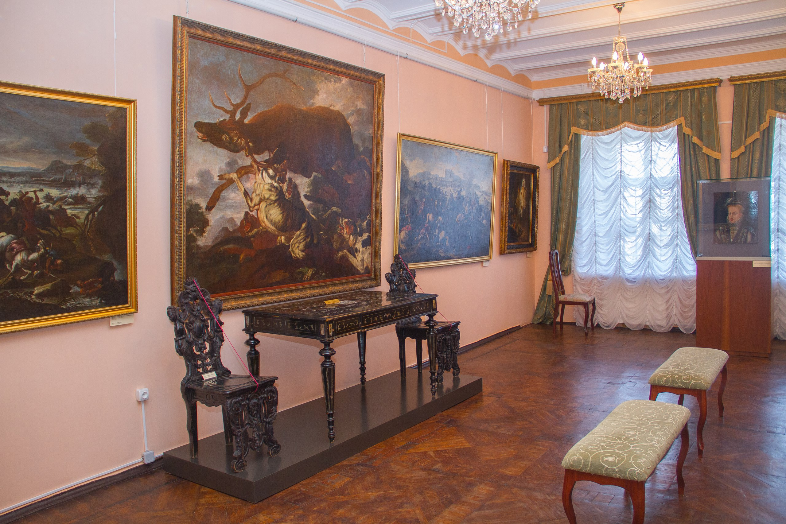 Зал Фландрии